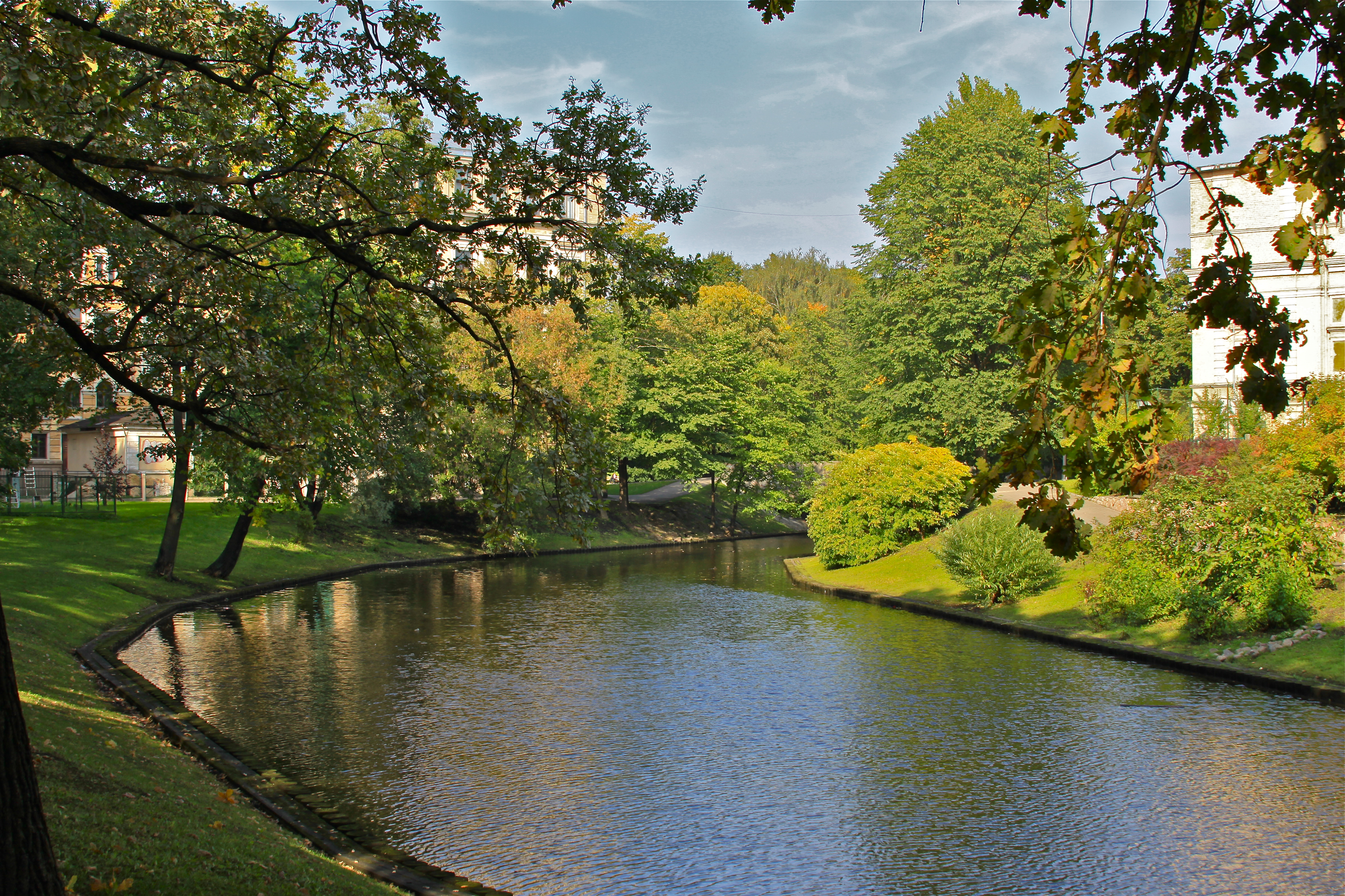 Фото парка Кронвалда в Риге